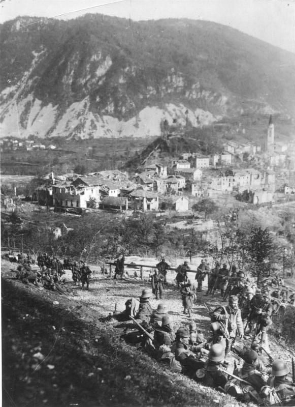 Isonzo-Schlacht, Truppen der Mittelmächte Isonzo Offensive Rastende verwundete Truppen vor dem gestürmten Santa Lucia im Isonzo-Tal [Oktober 1917] [Isonzoschlachten von Jui 1915 bis Oktober 1917.- Zwölfte Isonzoschlacht, 24. Oktober ? 27. Oktober 1917.- Deutsche / österreichische Truppen bei Rast]